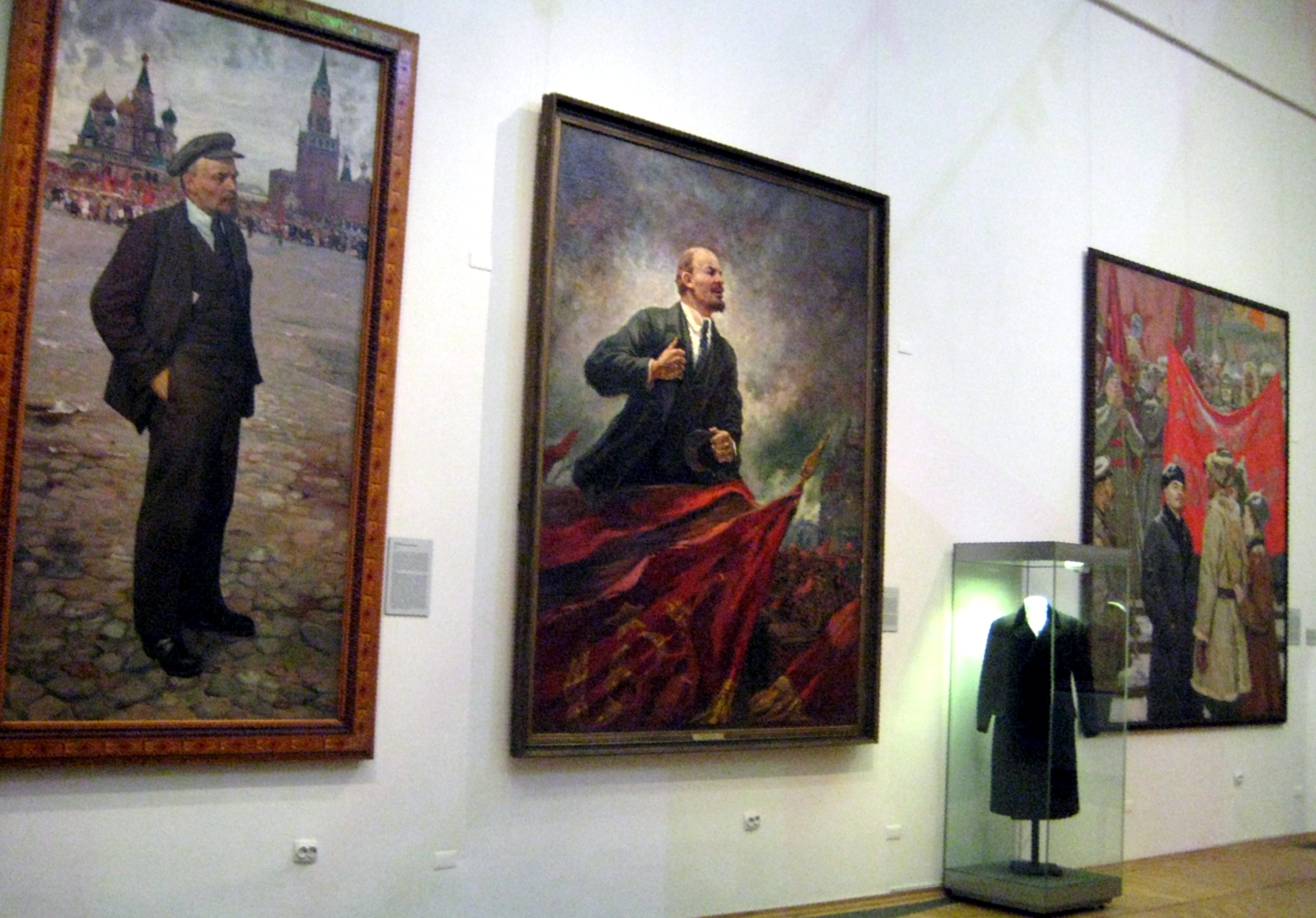 Выставка «Избранники Клио. Перед судом истории». ГИМ, 2011